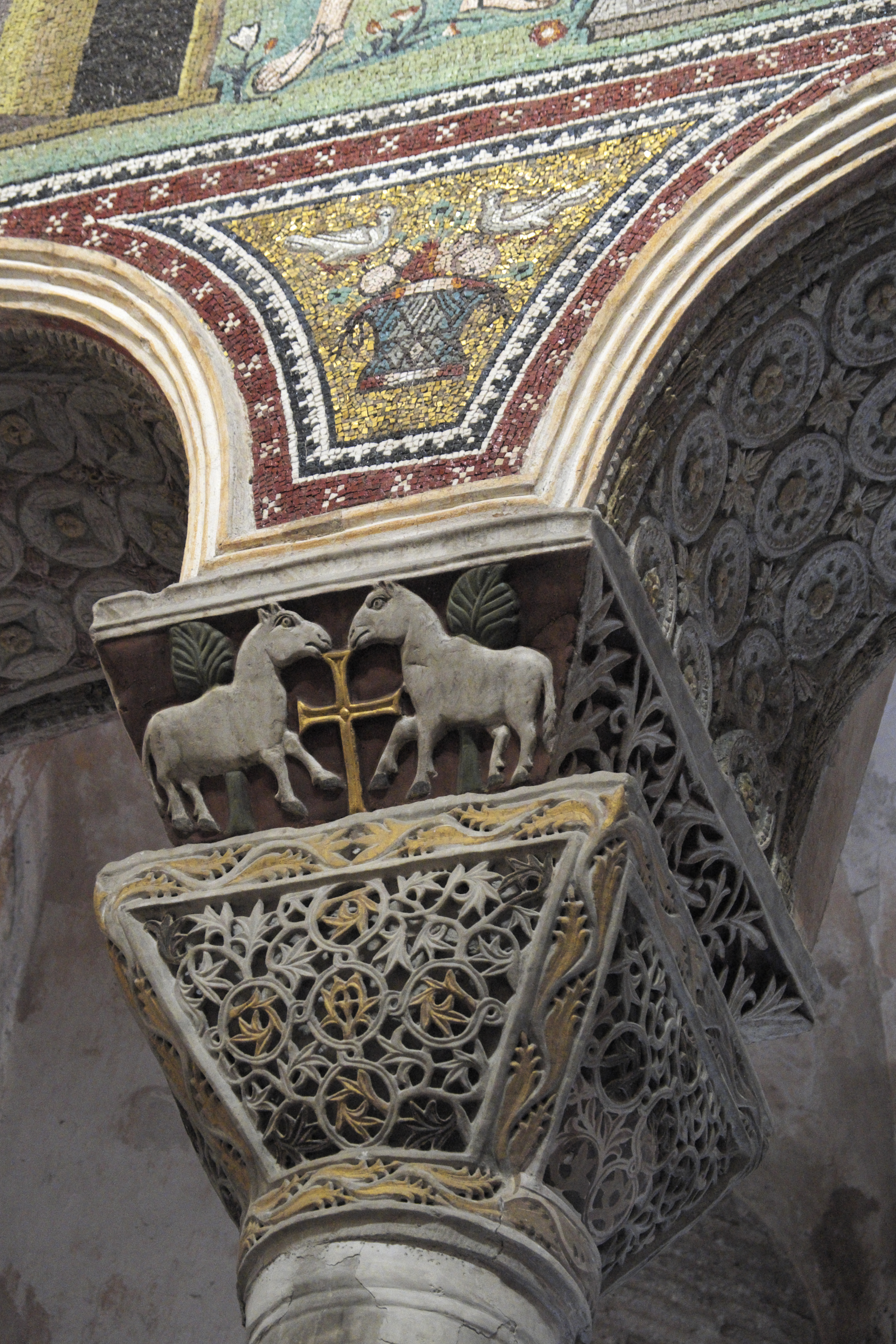 Kirche San Vitale in Ravenna (Emilia-Romagna/Italien), Kapitelle